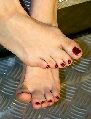 Pé de uma mulher portadora de Sindactilia